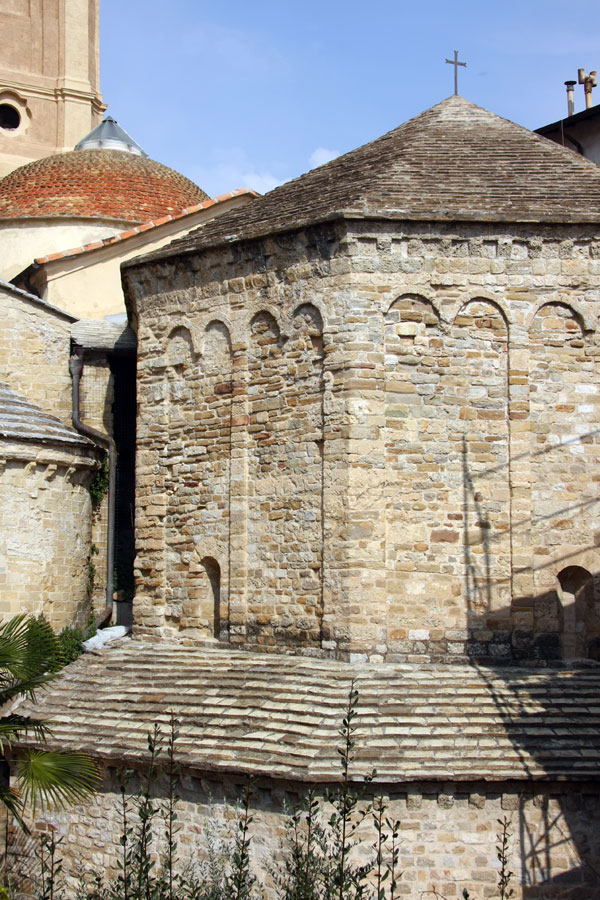 Scorcio esterno del battistero della cattedrale di Ventimiglia (IM)